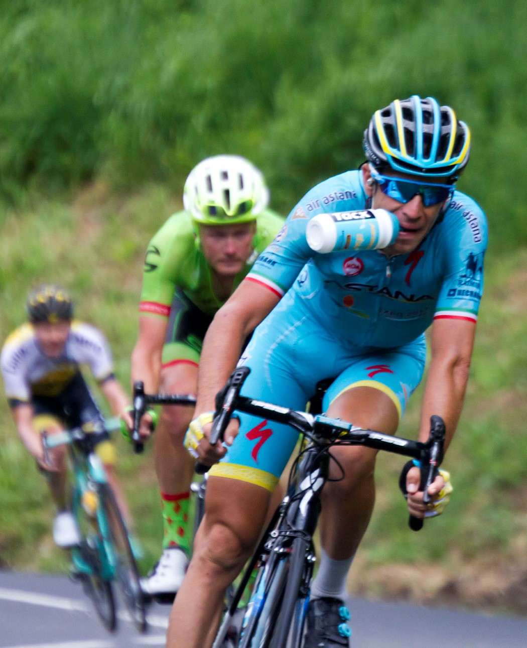 9202 nibali